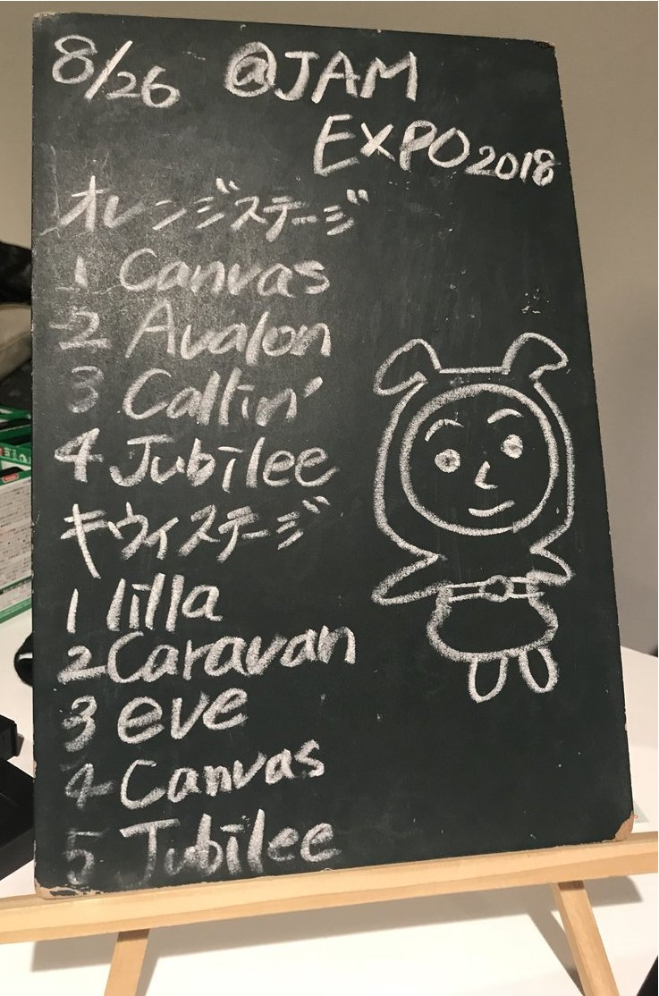 amiinAセトリボード(20180826(1))